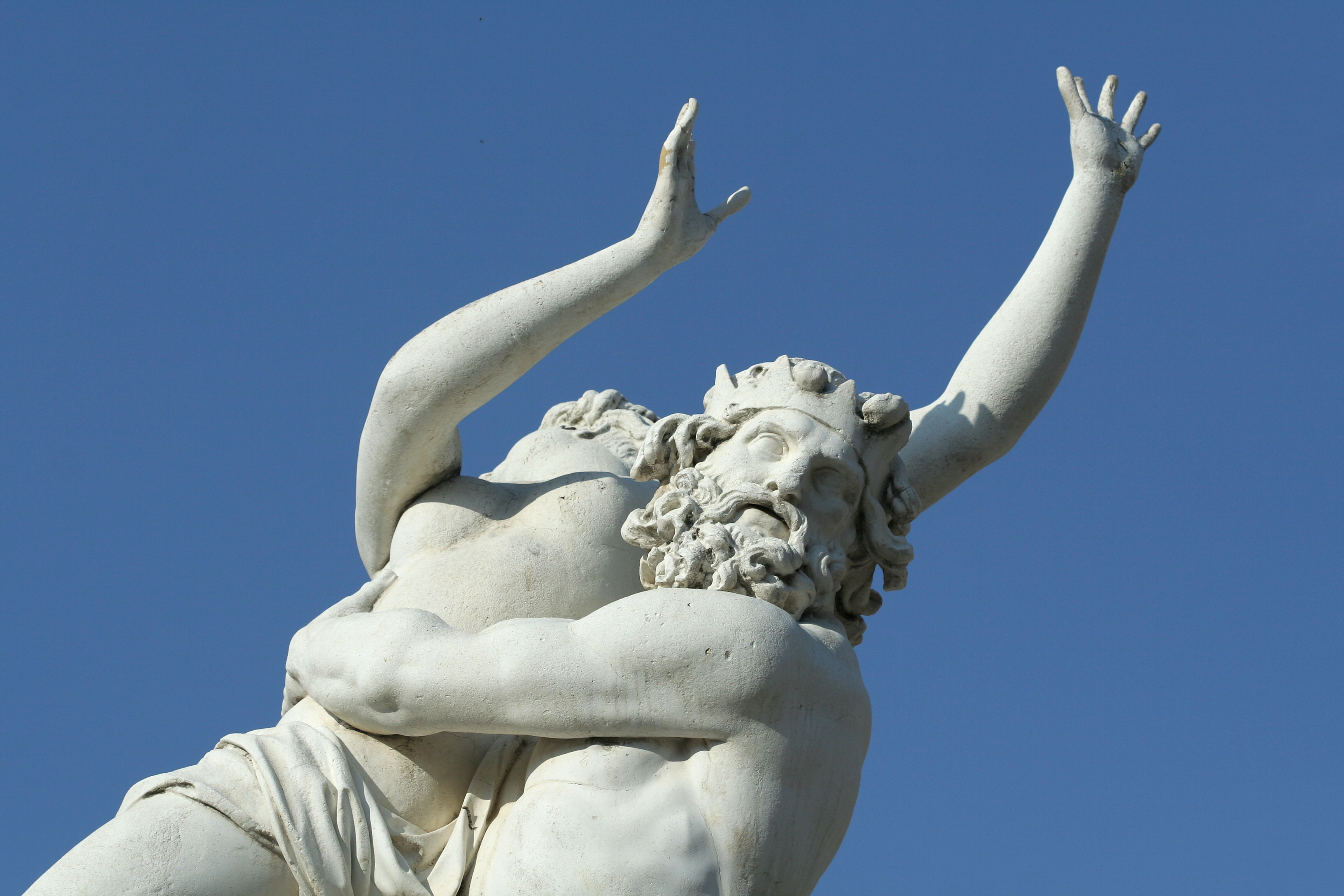 Parc de Versailles, bosquet de la Colonnade. Enlèvement de Proserpine par Pluton, moulage du groupe sculpté de François Girardon, 1677-1699.